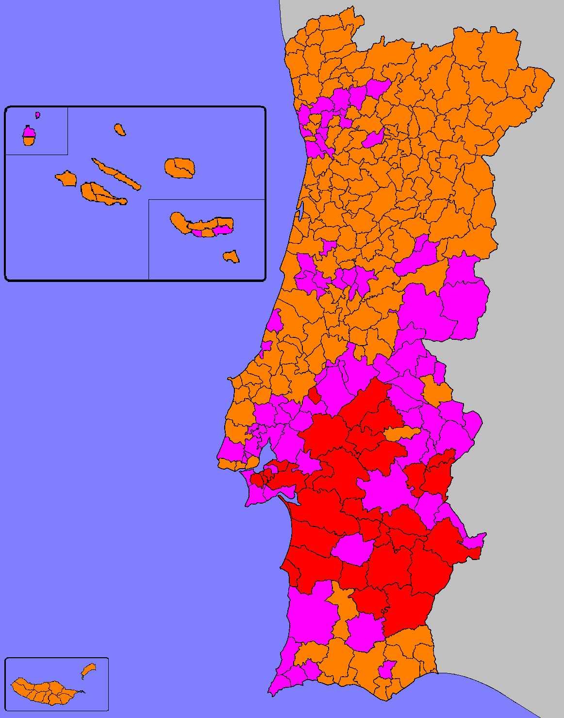 Mapa ilustrativo do partido mais votado por concelho